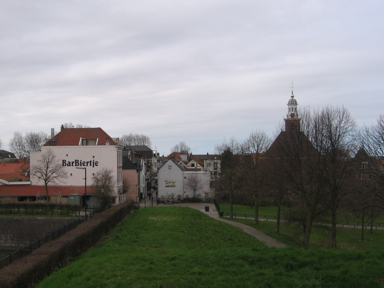 Hellevoetsluis